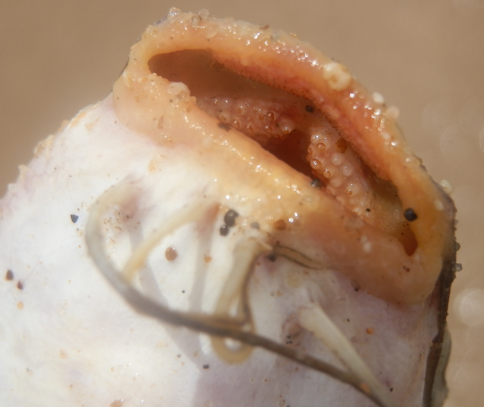 Papilas gustativas de un Pez gato